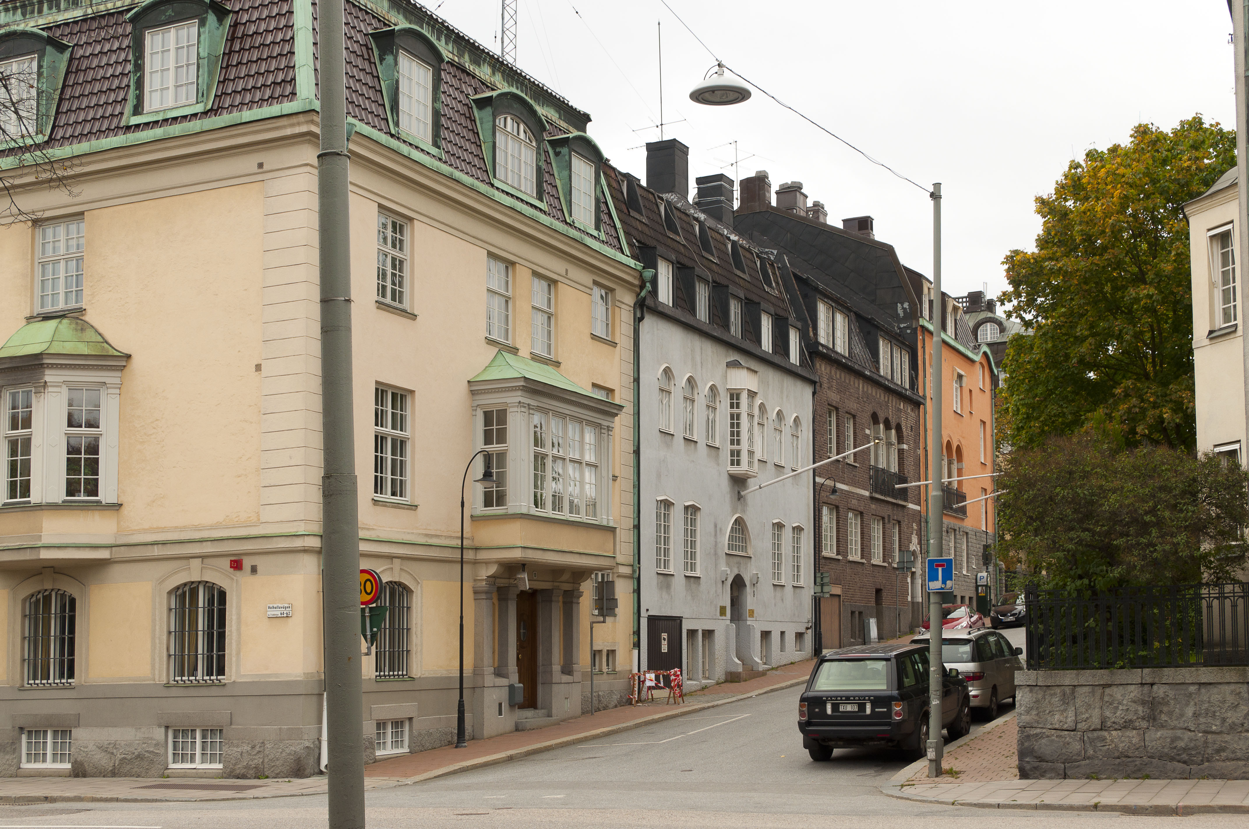 Tyrgatan 10-4 sedd från Valhallavägen, Stockholm. Från vänster; Tyrgatan 10/Valhallavägen 62 (Trädlärkan 5): Byggnadsår 1910-12, arkitekt V Bodin, byggherre och byggmästare Alfr Andersson. Tyrgatan 8 (Trädlärkan 4): Byggnadsår 1909-1910, arkitekt K Pettersson, byggherre A Rossander, byggmästare A Nordström. Tyrgatan 6 (Trädlärkan 3): Byggnadsår 1909-10, arkitekt och byggherre T Thorén, byggmästare E Öfverberg. Tyrgatan 4 (Trädlärkan 2): Byggnadsår 1909-10, arkitekt T Thorén, byggherre C Lundström, byggmästare PD Larsson